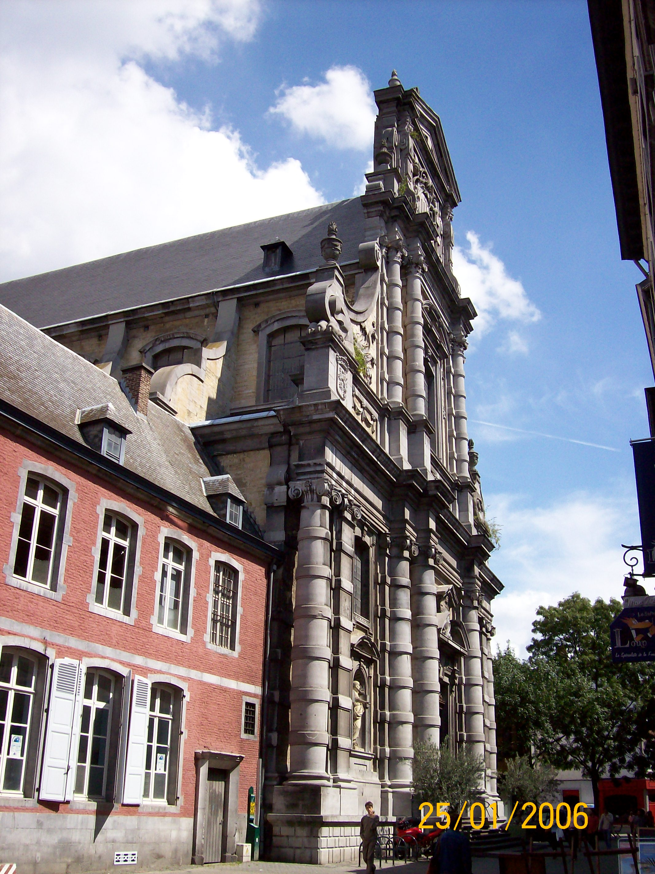 Eglise Saint-Loup, Namur